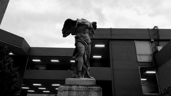 Escultura replica de Victoria de Samotracia, en la explanda principal de la Facultad de Artes y Diseño campus Xochimilco